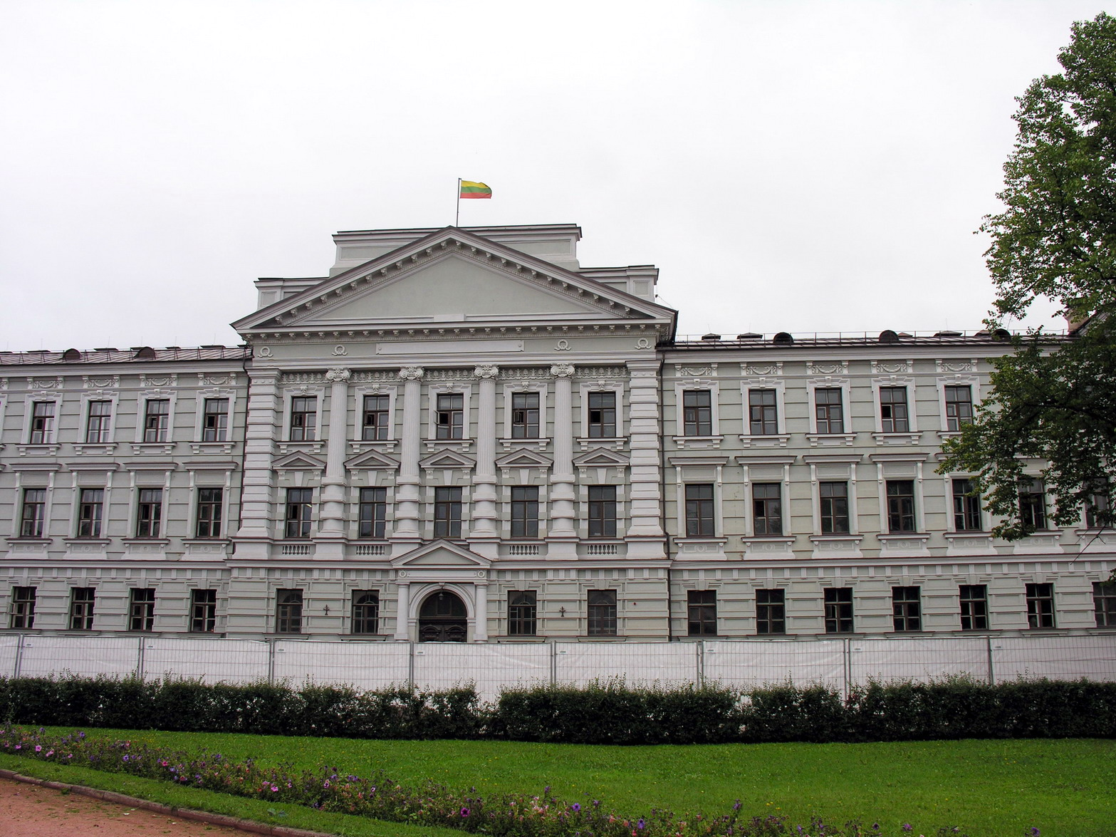 Lietuvos apeliacinis teismas, tame pačiame pastate yra ir Okupacijų ir laisvės kovų muziejus